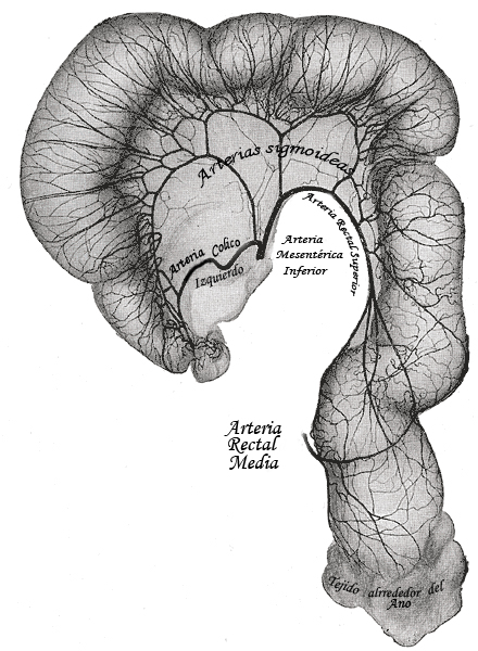 Arteria rectal media y otros